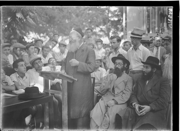 קרית ענבים, הרב הראשי לתל-אביב, ר' משה אביגדור עמיאל, נואם בפתיחת הישיבה התיכונית ישיבת "היישוב החדש"